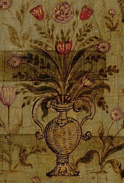 Фрагмент иконы Богородицы "Ветроград заключенный"